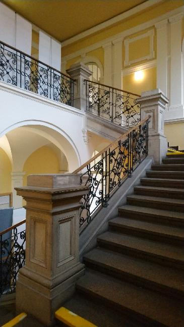 SPŠ stavební Brno interiér